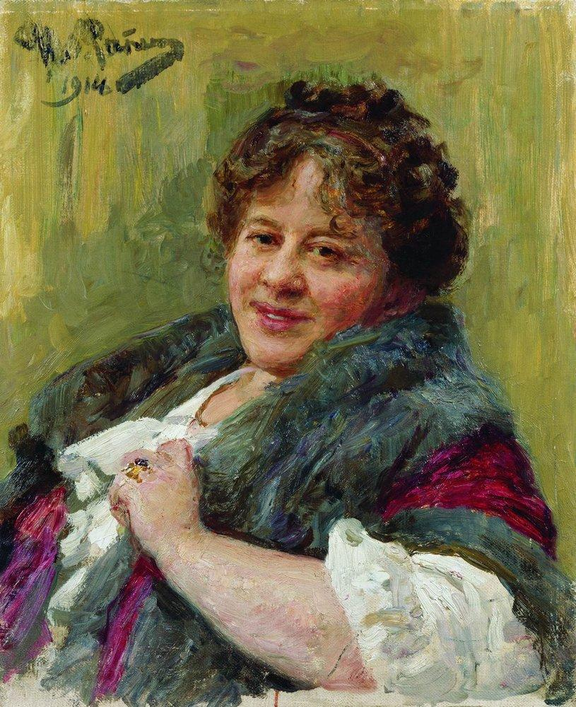 Portrait of writer, dramatist, poetess and translator Tatiana Lvovna Shchepkina-Kuperniklabel QS:Lru,"Портрет писательницы, драматурга, поэтессы, переводчицы Татьяны Львовны Щепкиной-Куперник" label QS:Len,"Portrait of writer, dramatist, poetess and translator Tatiana Lvovna Shchepkina-Kupernik" label QS:Les,"Retrato de la escritora, dramaturga, poetisa y traductora Tatiana Lvovna Schépkina-Kupernik"